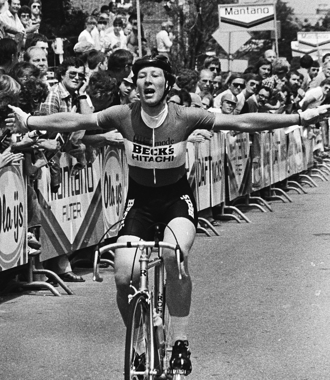 Nederlandse Kampioenschappen Wielrennen Dames 1979 in Geulle (Limburg); Tineke Fopma 23 juni 1979